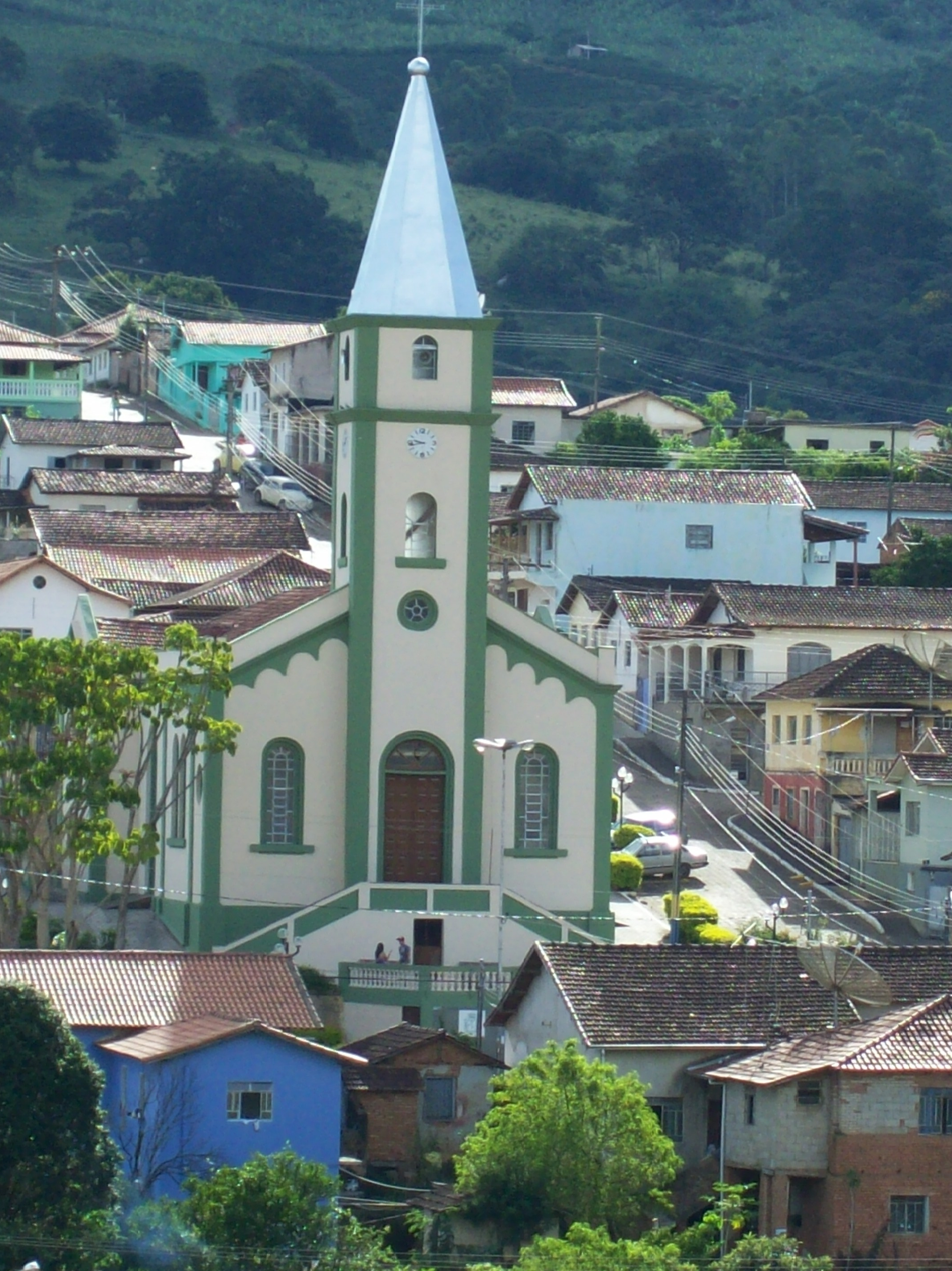 Matriz São Joao Batista, São Joao da Mata, MG